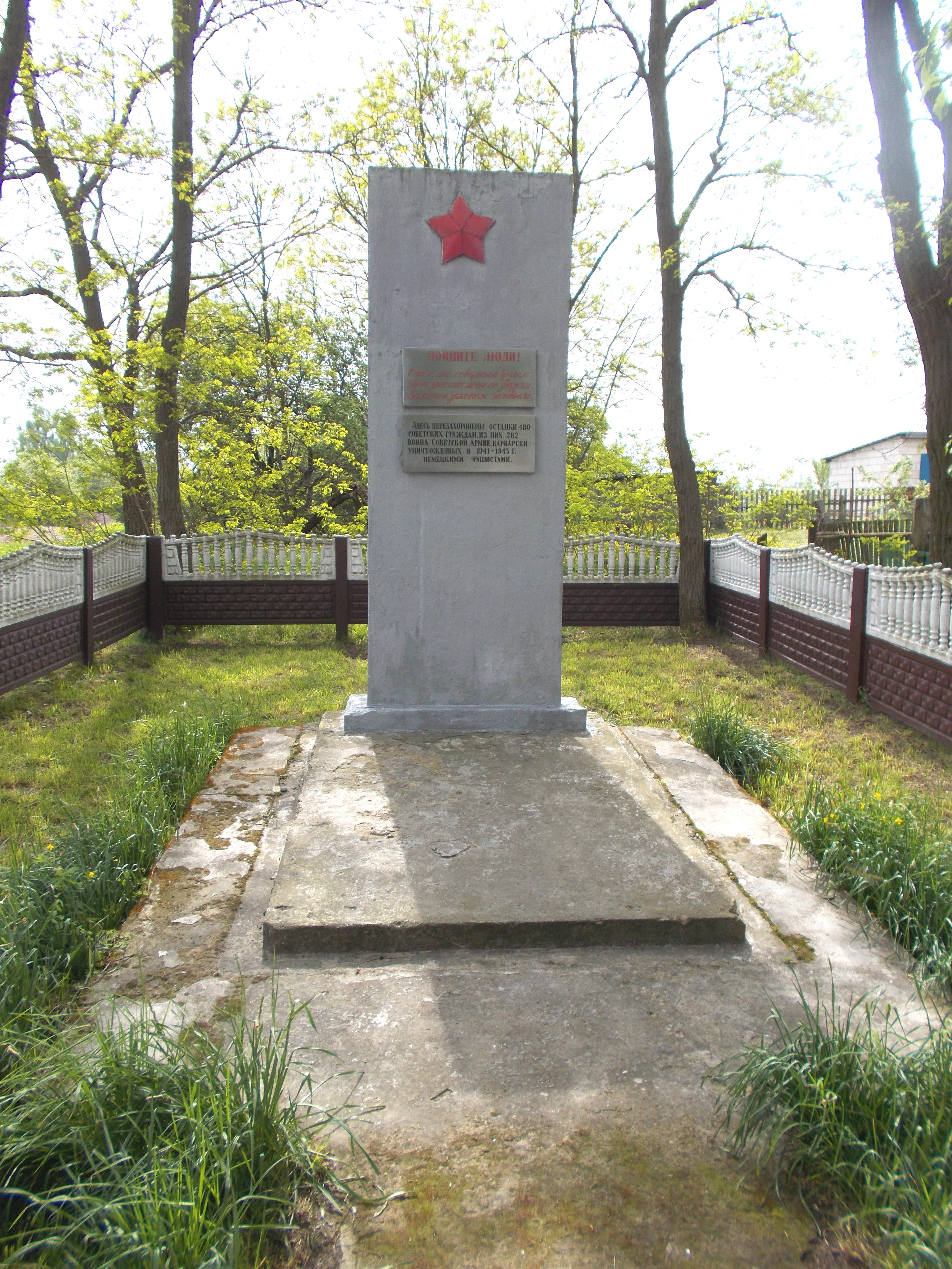 Памятник в Лахве евреям и военнопленным, убитым нацистами.